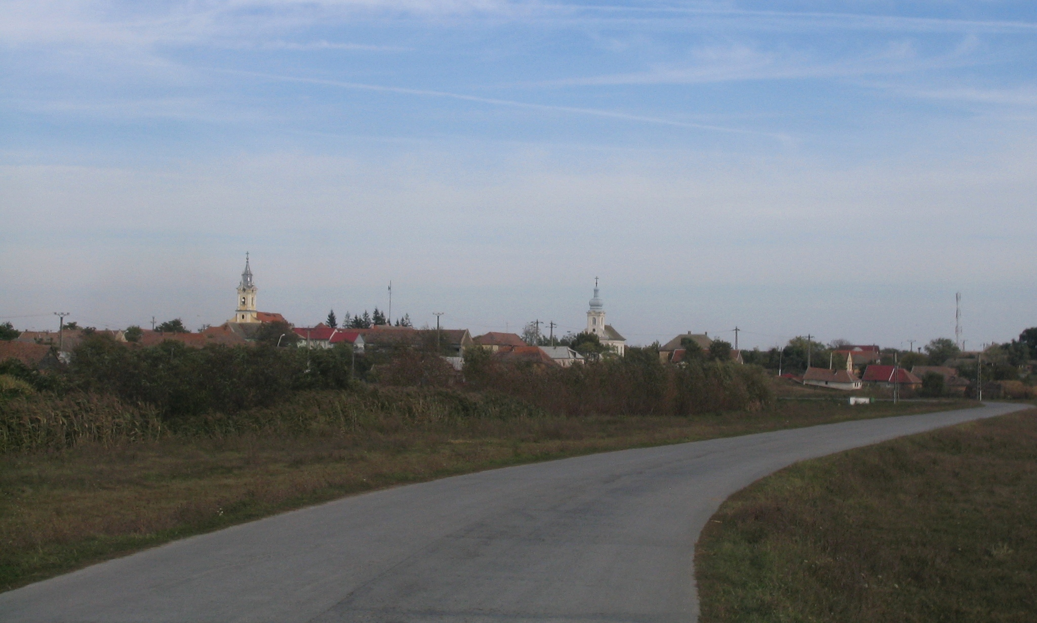 Vedere a comunei Satchinez, jud. Timiș